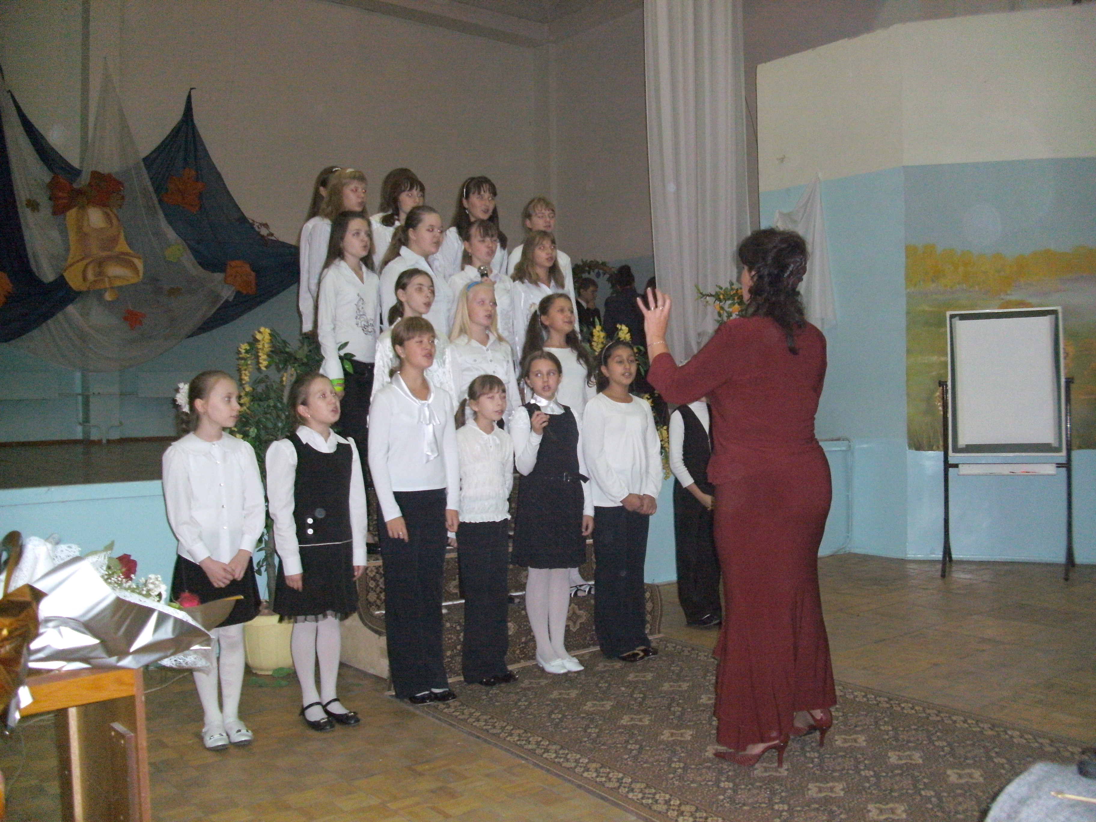 Выступления хорового коллектива гимназии 79 г. Ульяновска